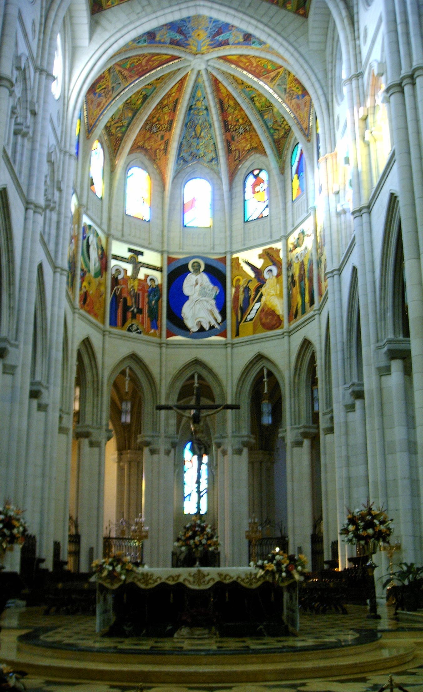 Altar de la Catedral de la Almudena, Madrid Año:2005 Autor: Beatriz M.R.